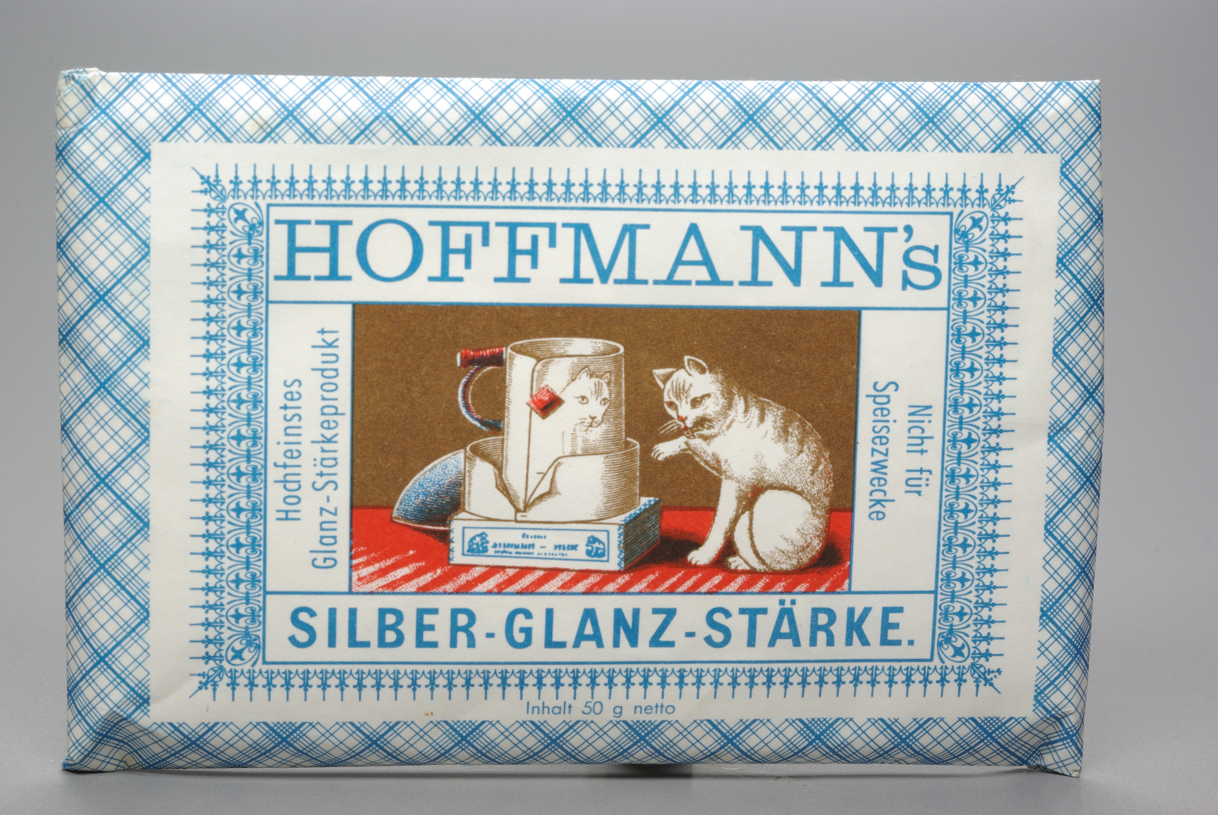 Silber-Glanz-Stärke Hoffmann´s Stärkefabriken, Salzuflen.